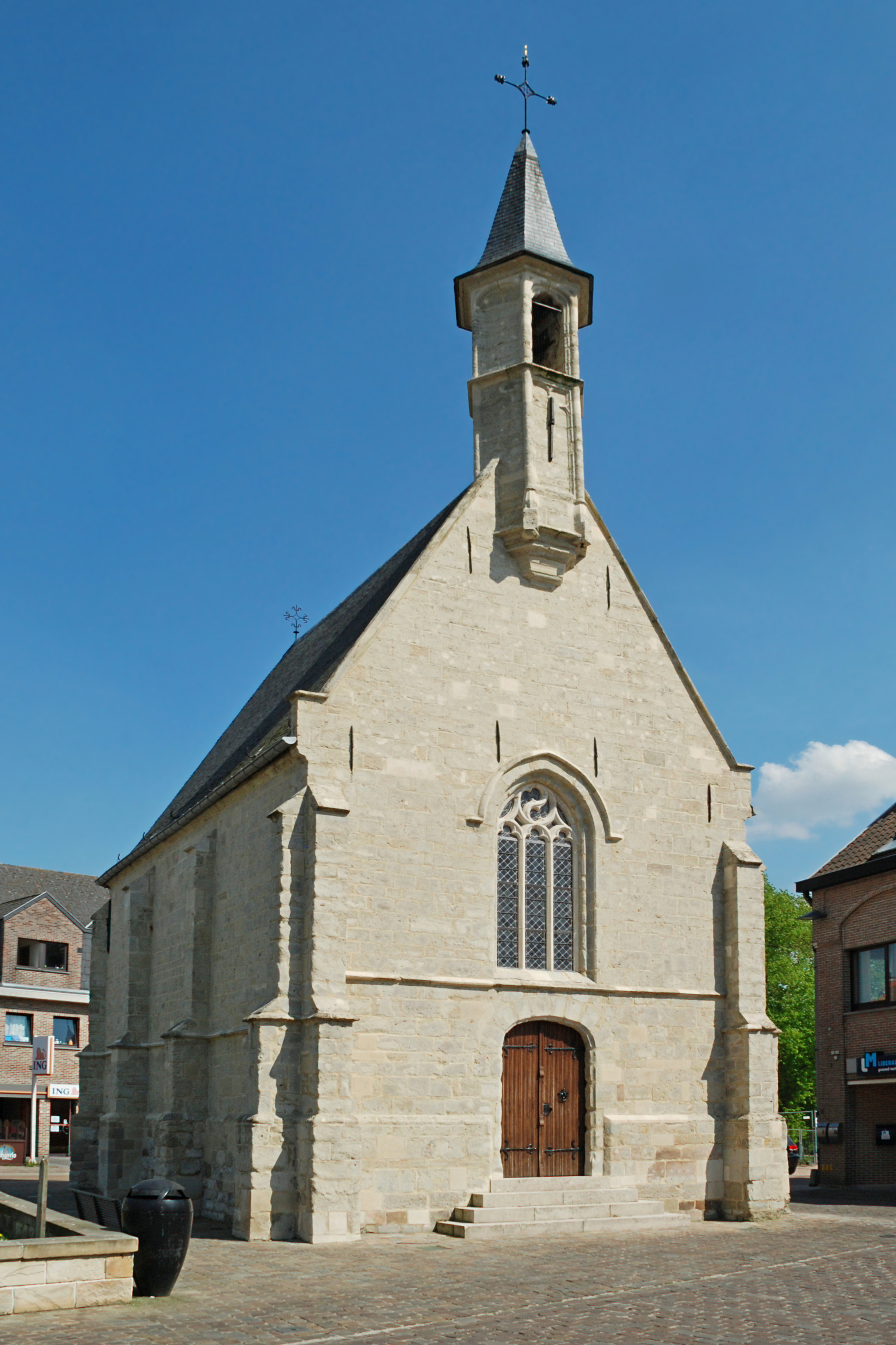 Belgique - Flandre Orientale - Alost - Moorsel - Chapelle Sainte-Gudule This photo of immovable heritage has been taken in the Flemish Region